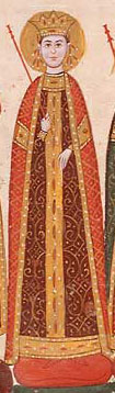 Кера Тамара Българска, дъщеря на цар Иван Александър, миниатюра от Лондонското евангелие на Иван-Александър